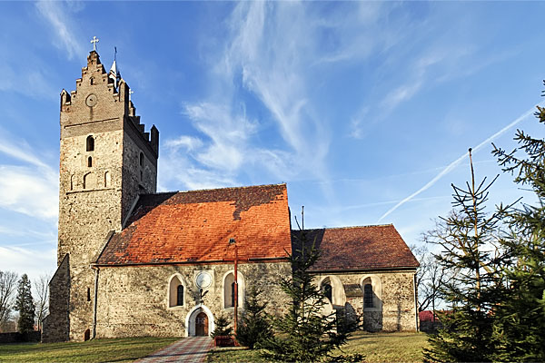 Mycielin - kościół